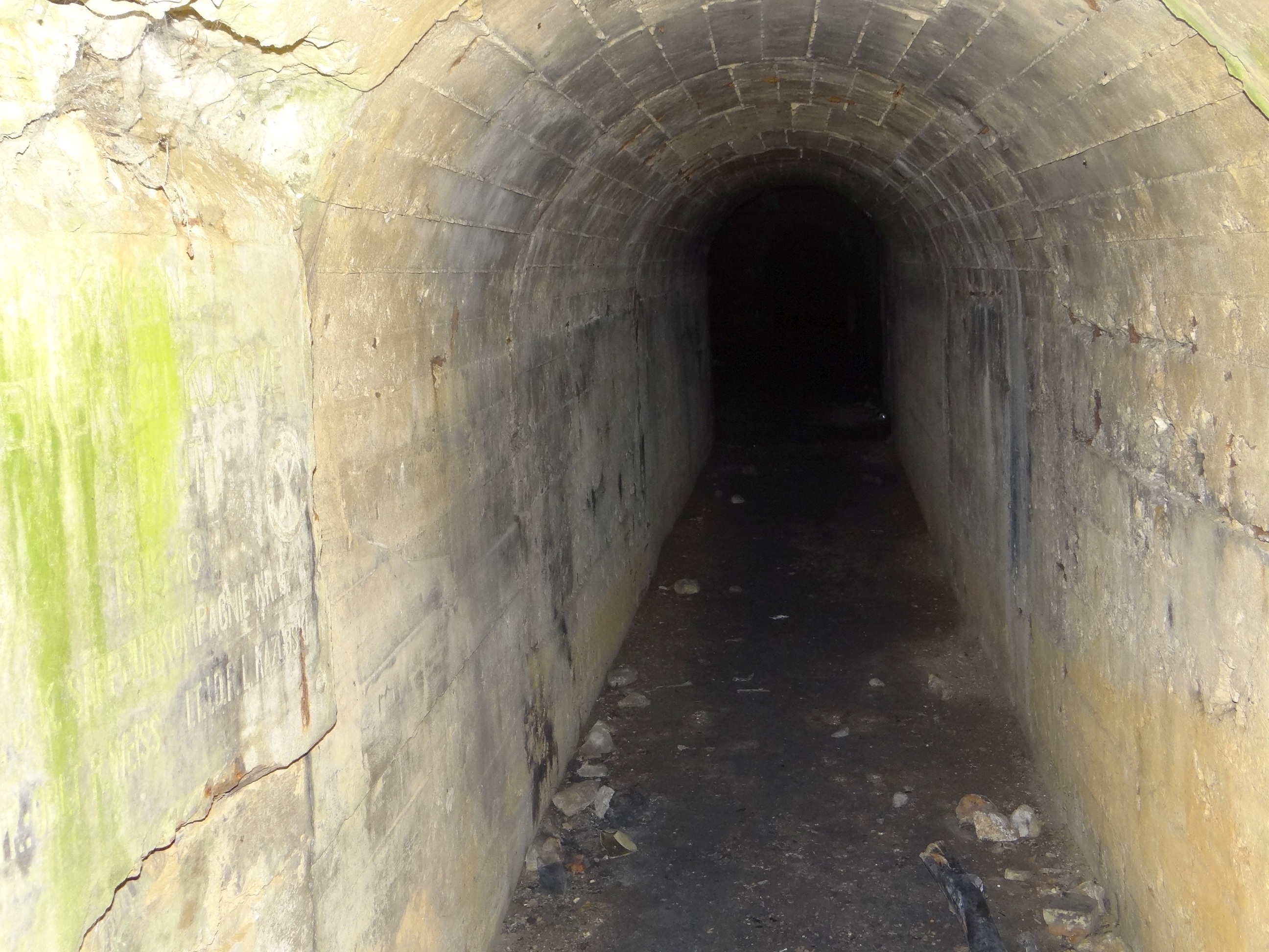 Kawerna Kostrze na wzgórzu Solnik w Krakowie